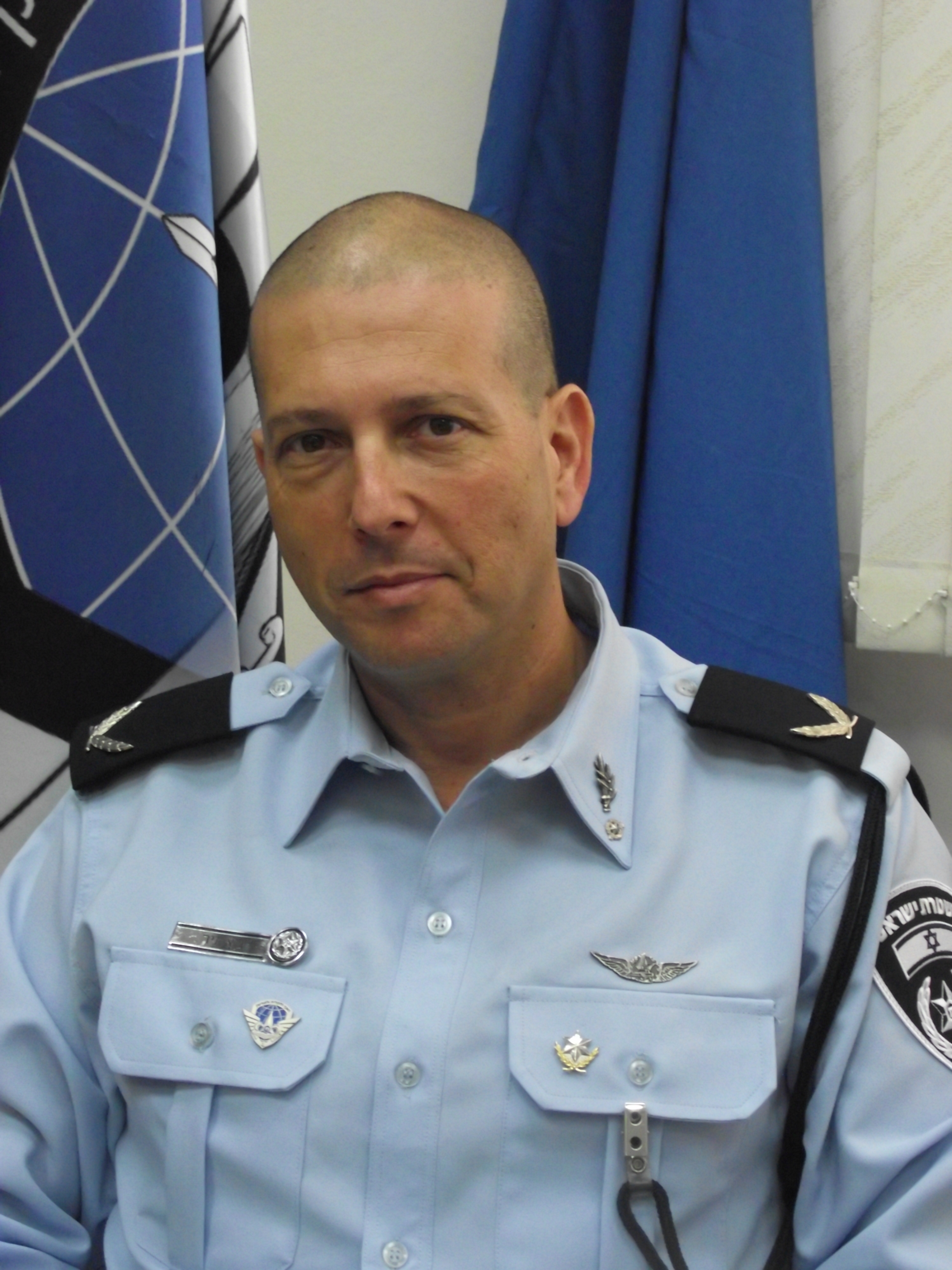 תת ניצב גיא ניר